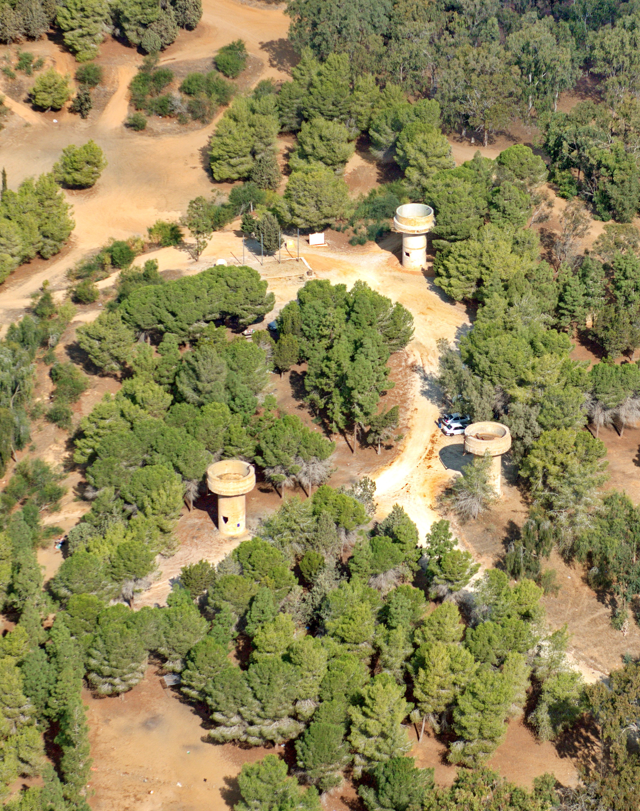 גבעה 69 היא אחת הגבעות ברכס ממזרח לרצועת חולות מישור החוף. שמה ניתן לה בגלל גובהה מעל פני הים. הגבעה נמצאת כקילומטר מזרחית לקיבוץ ניצנים, מזרחית לכביש החוף. בתקופת המנדט בנו הבריטים שלושה מגדלי מים כדי לספק מים למחנות הצבאיים בסביבה ולכן כונתה הגבעה גם בשם "גבעת שלושת המגדלים".